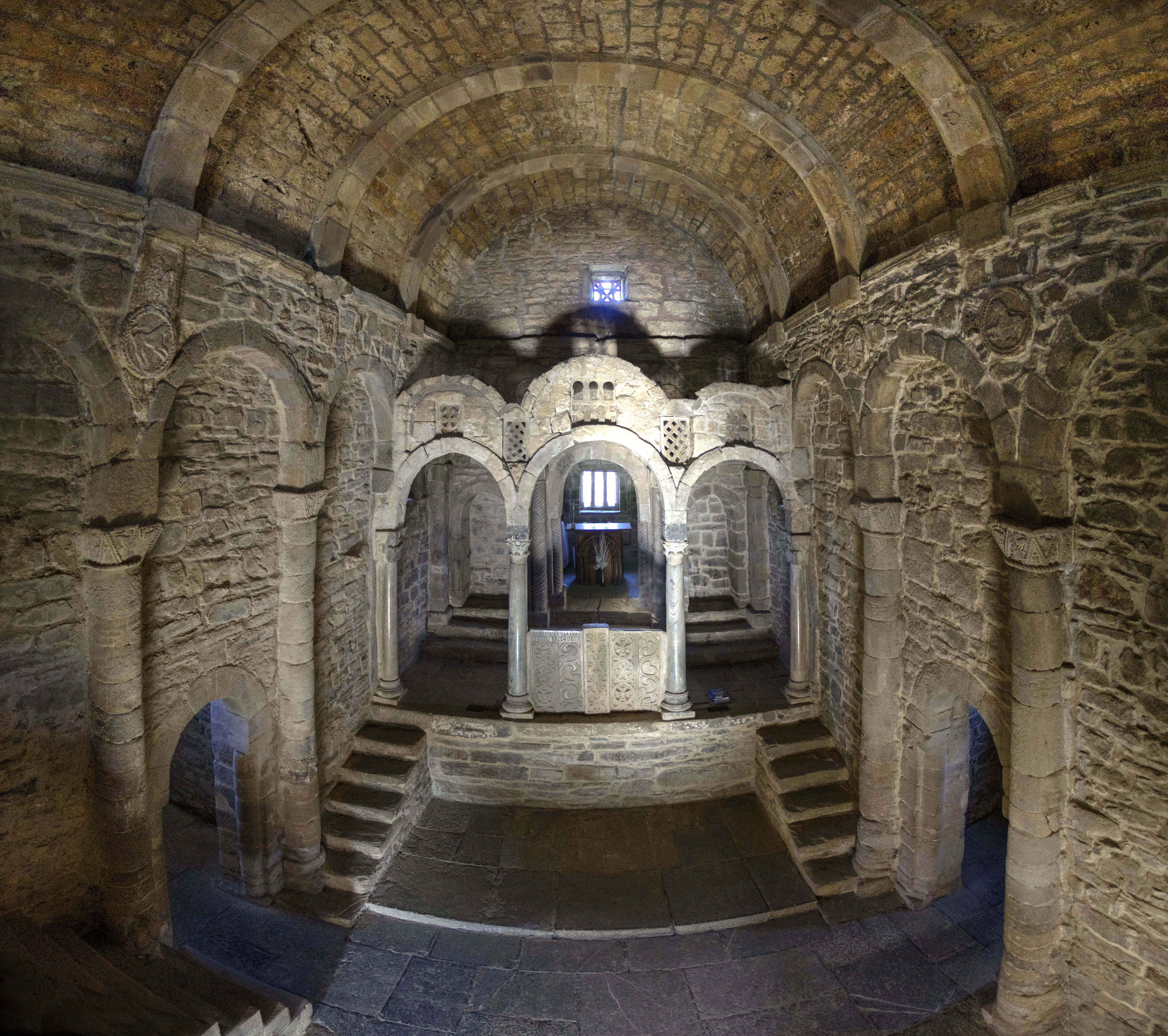 Iglesia prerrománica construida en el siglo IX (año 852). Está en la parroquia de Felgueras, concejo de Lena (Asturias, España). La foto está tomada desde la tribuna, situada encima de la entrada. Es visible el iconostasio que separa la zona común de la del oficiante, situada a un nivel superior al que se accede por dos escaleras laterales. La imagen es una fusión de tres tomas realizadas con un objetivo de 10.5 mm.